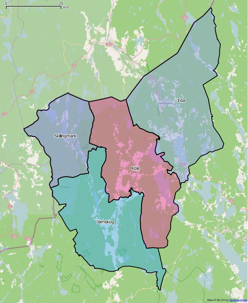 Distriktsindelningen i Eda kommun